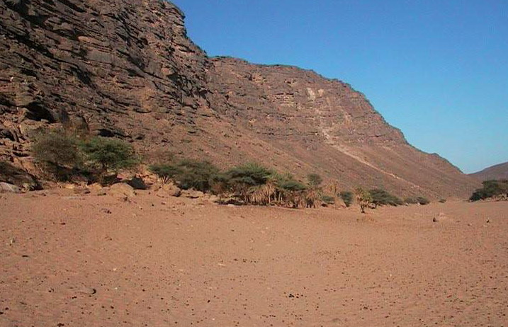 جبل علبة.